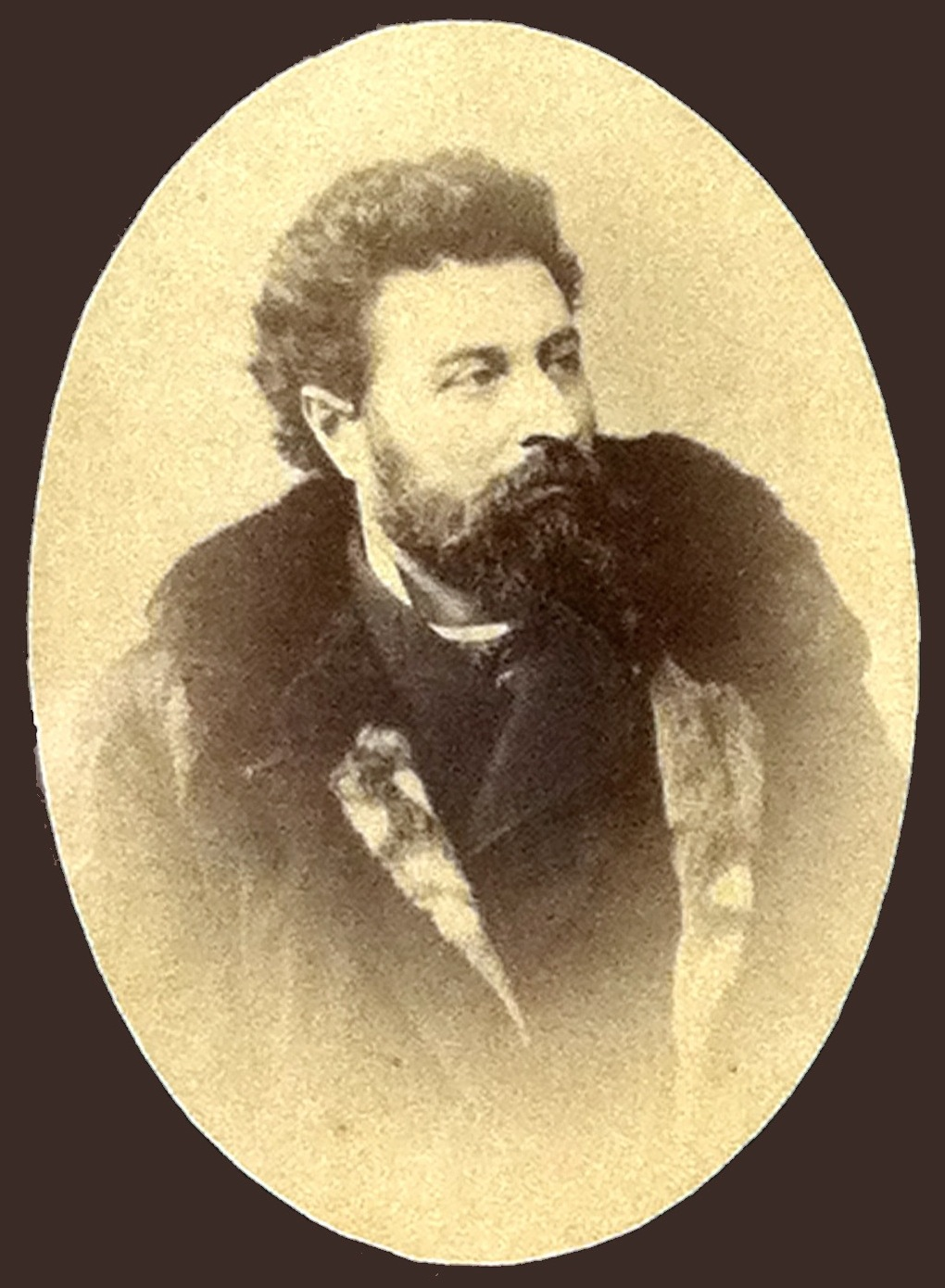 Copia del ritratto fotografico in possesso dei Pronipoti.